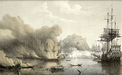 Slag bij Palermo 2 juni 1676